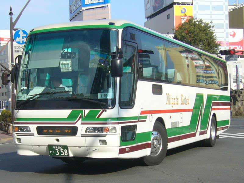 新潟200か・358。新潟交通所属高速用車両 （各系統で共通運用）。長野駅前にて撮影。